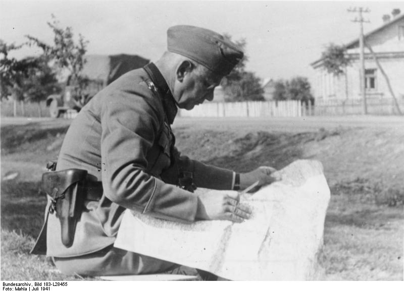 An der Sowjetfront: (Ukraine) Generalfeldmarschall Reichenau beim Studium der Karte. PK-Aufnahme: Kriegsberichter Mahla 7614-41 "Fr.f.D." "Fr.OKW" Juli 1941